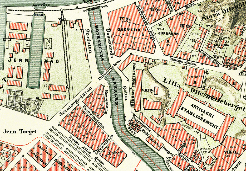 Bilden visar kvarteret Röda Bryggan i stadsdelen Pustervik i Göteborg år 1888. Kvarteret syns i mitten av kartan, söder om Pustervikskanalen, och omges av Järntorgsgatan, Bro-gatan och Pusterviksgatan.